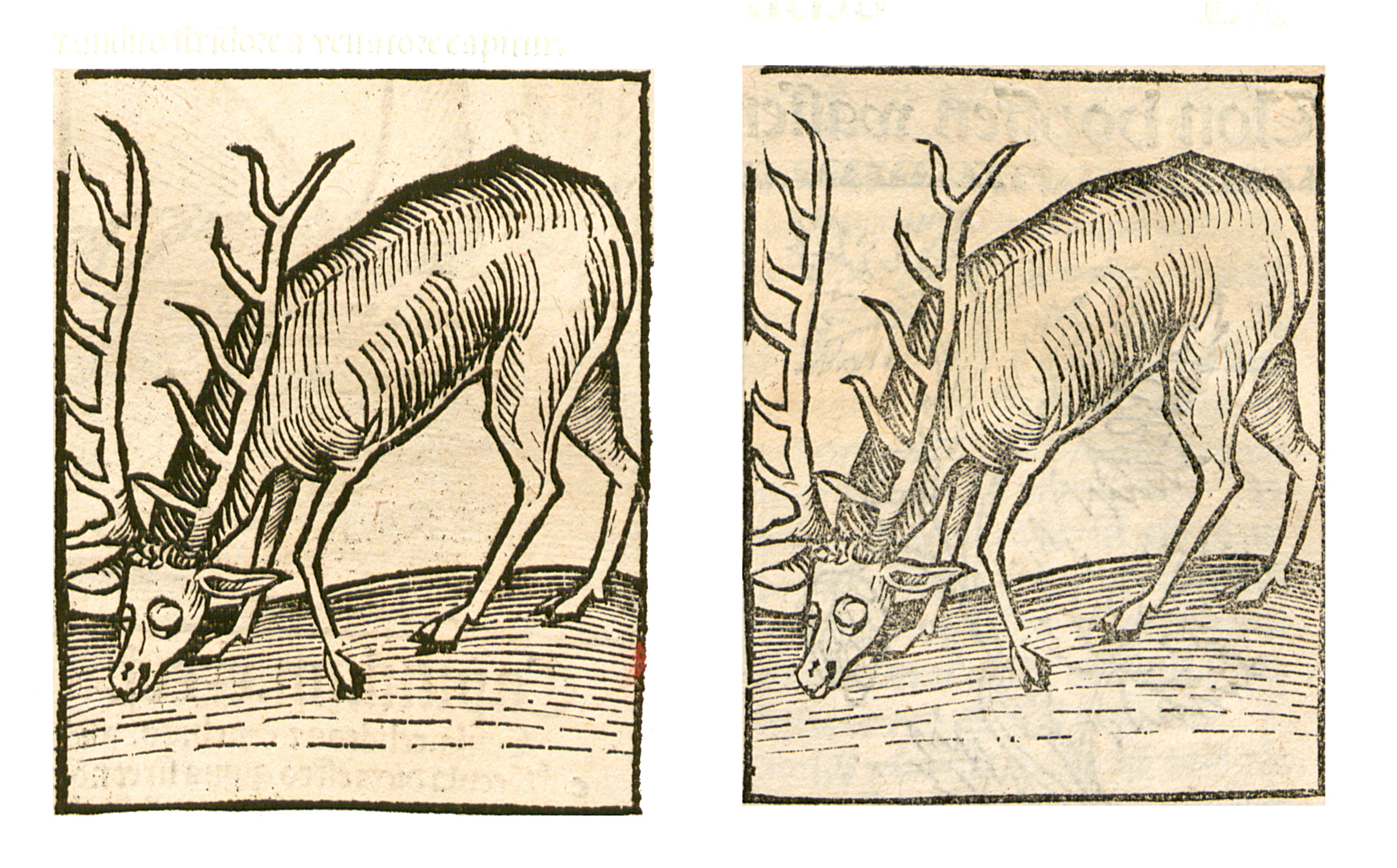 Abbildung von: Hyrtz Horn (Cervus)